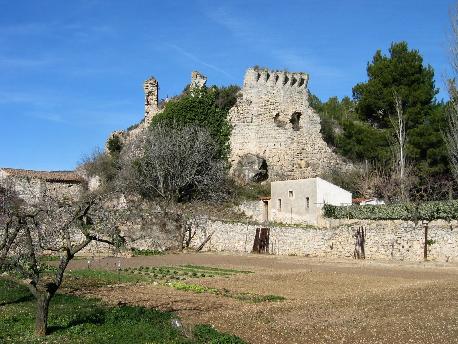 Castell de Querol, querol, Alt Camp, Catalunya.